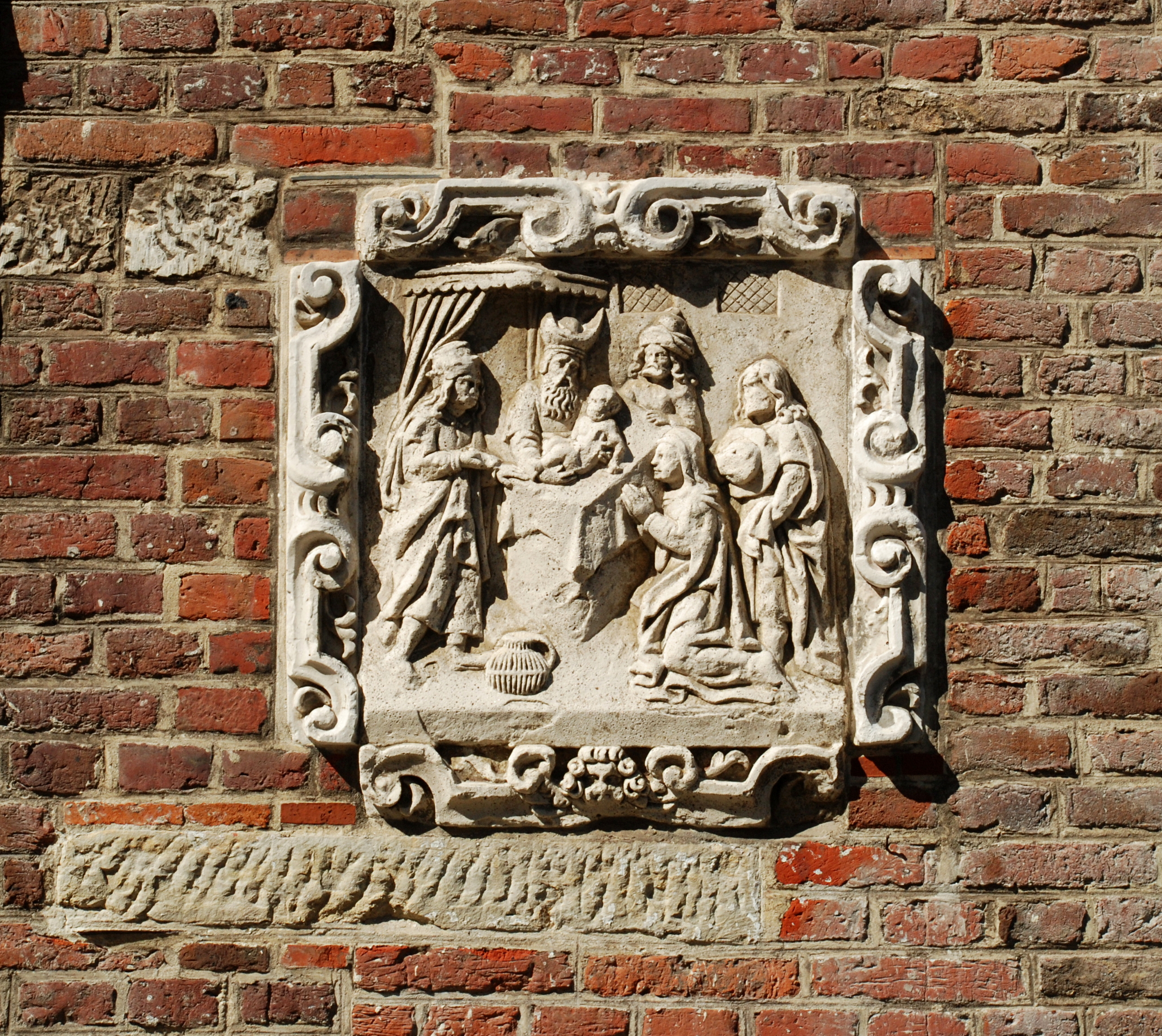 Belgium - Leuven - Groot Begijnhof - Heilige Geesttafel - Middenstraat n° 16